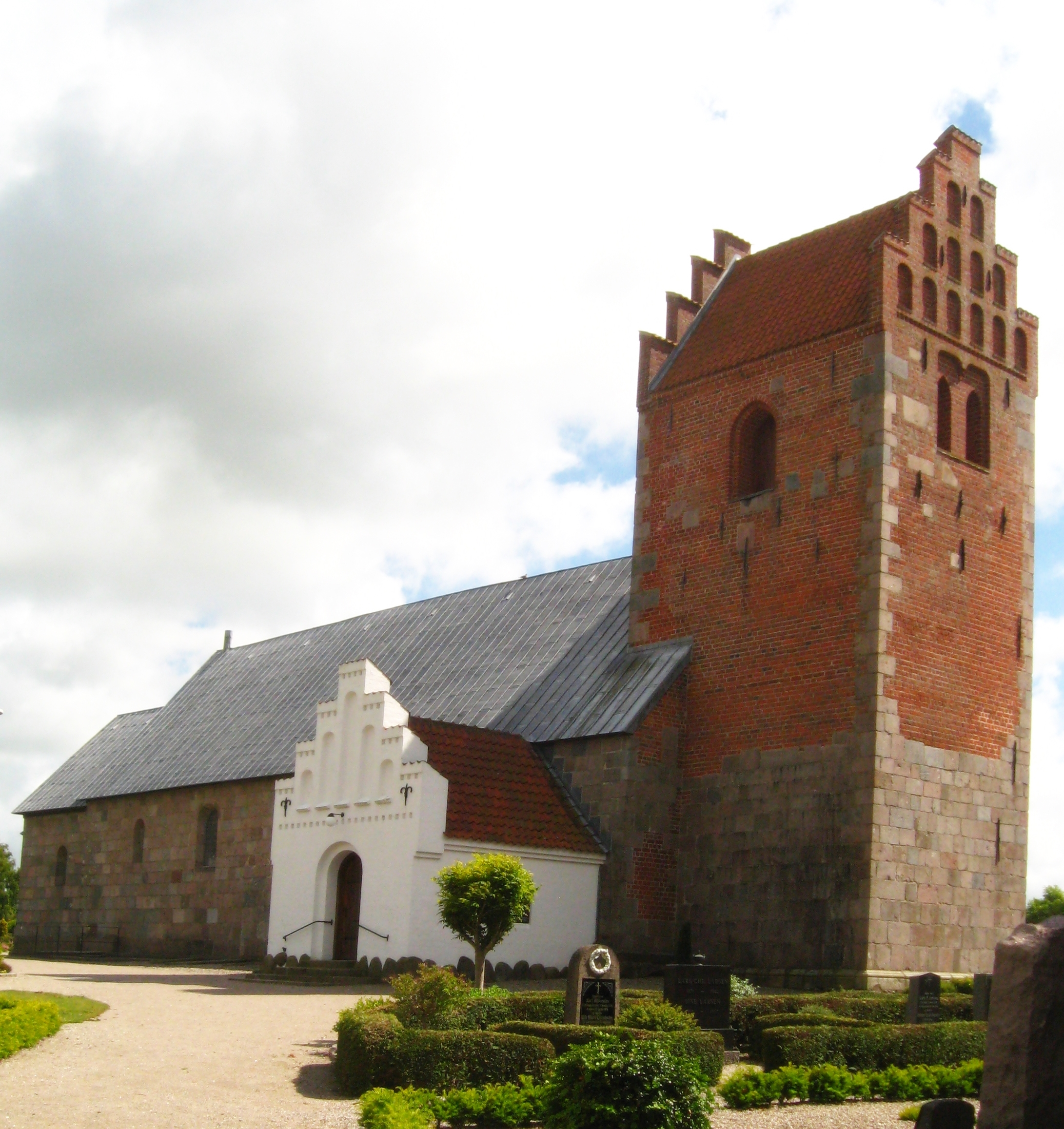 Øster Brønderslev Kirke